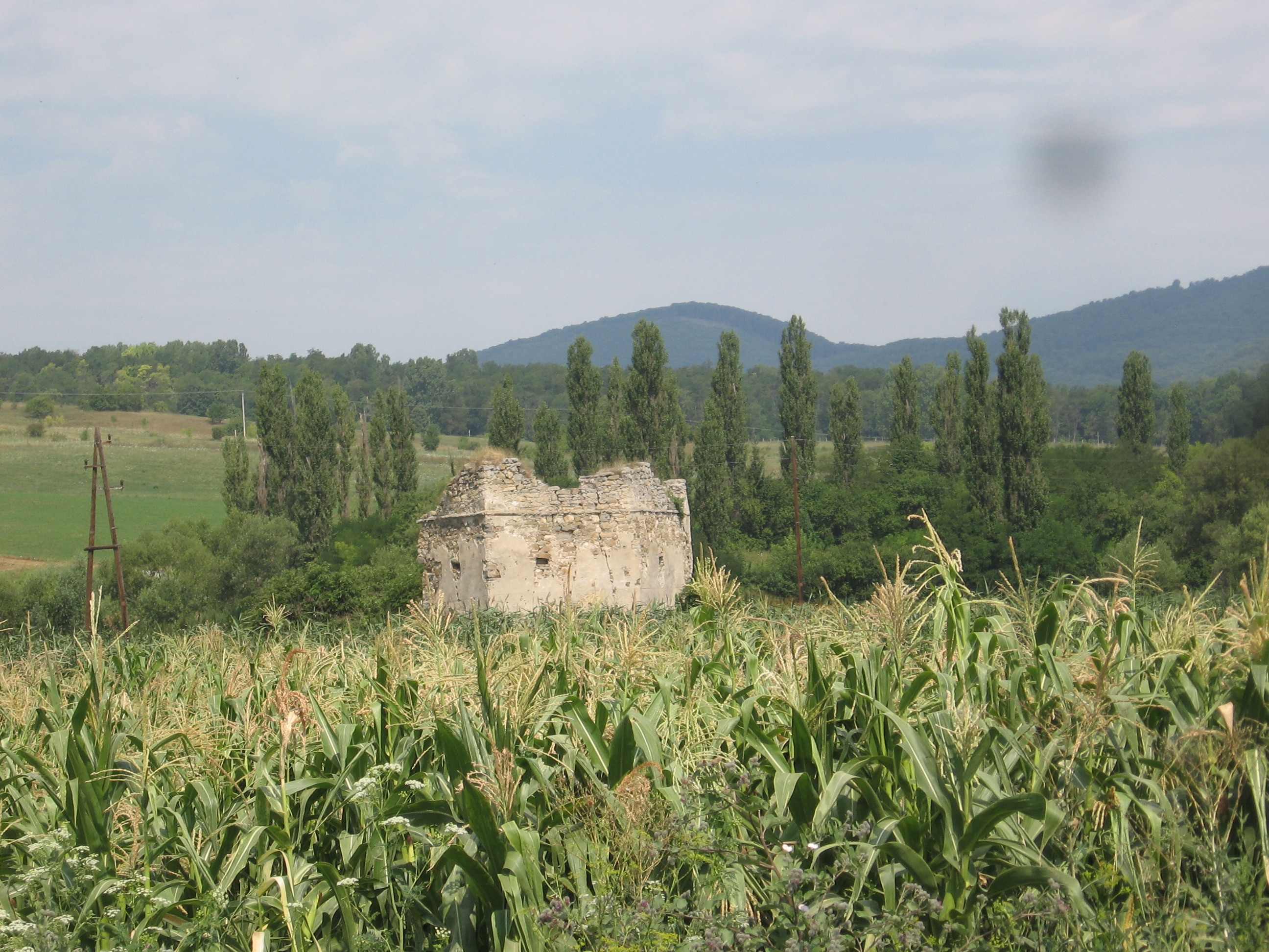 Turn de cetate - cetatea de apa, abatia